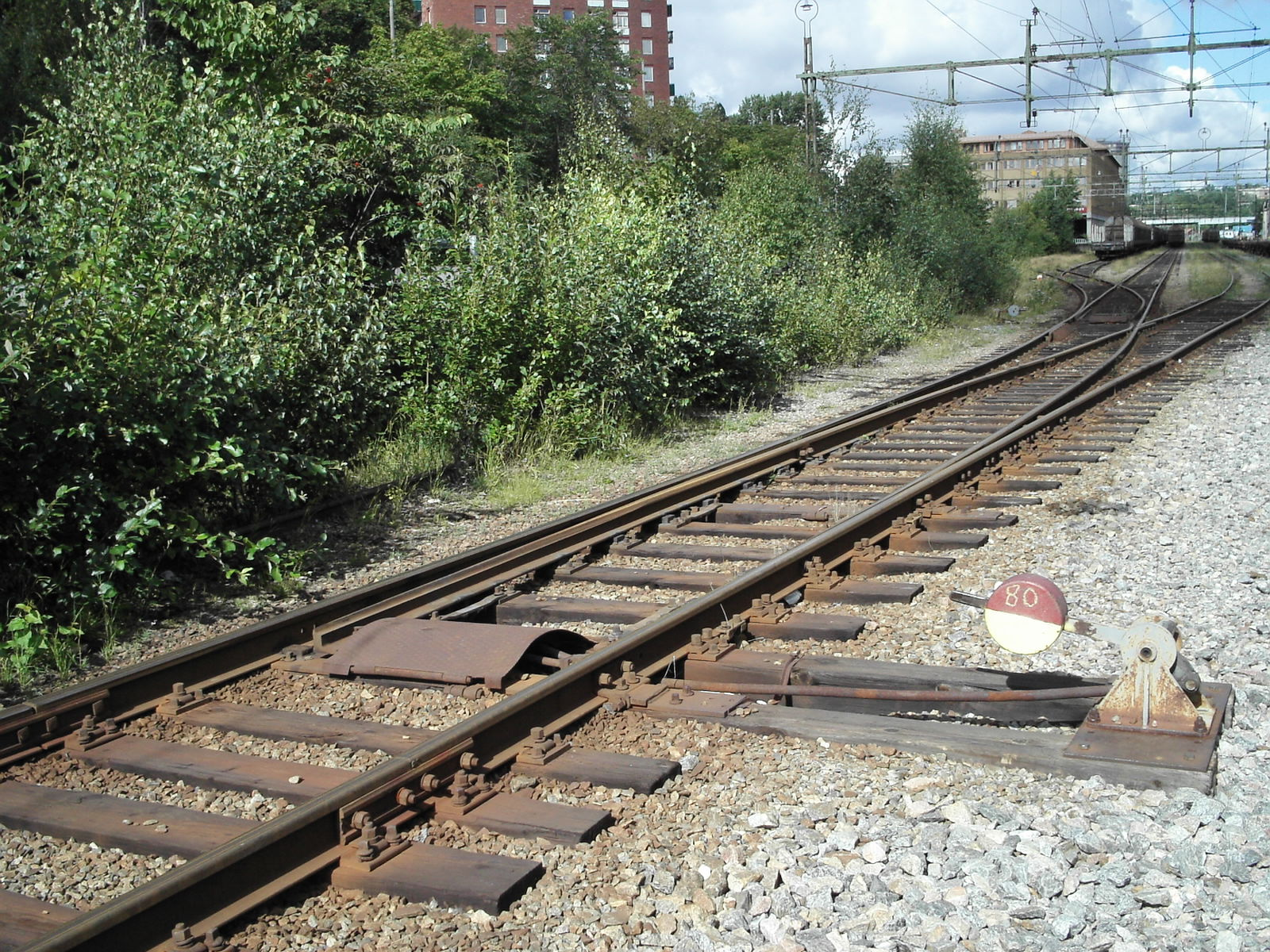 Klotväxel